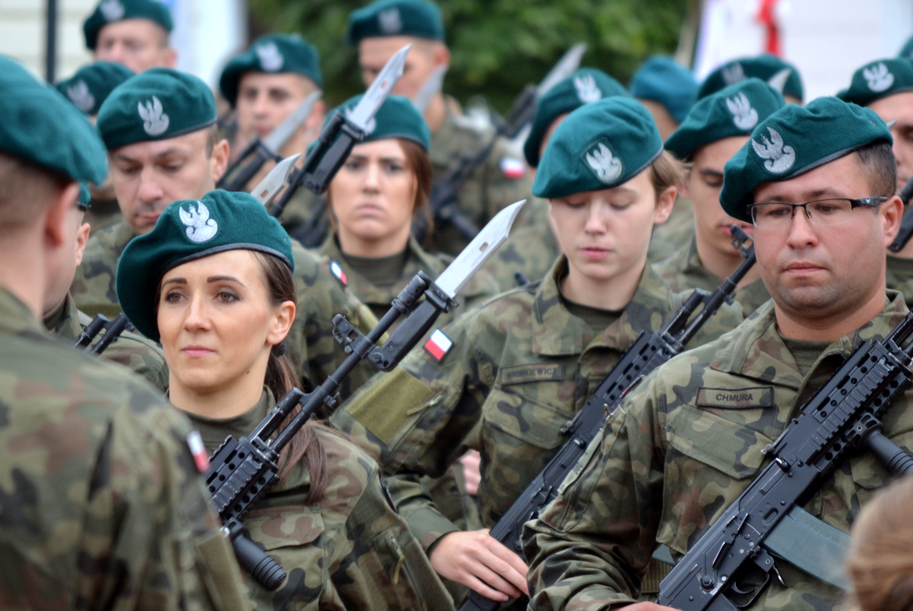 WOT-Soldaten, Karpatenvorland-Brigade